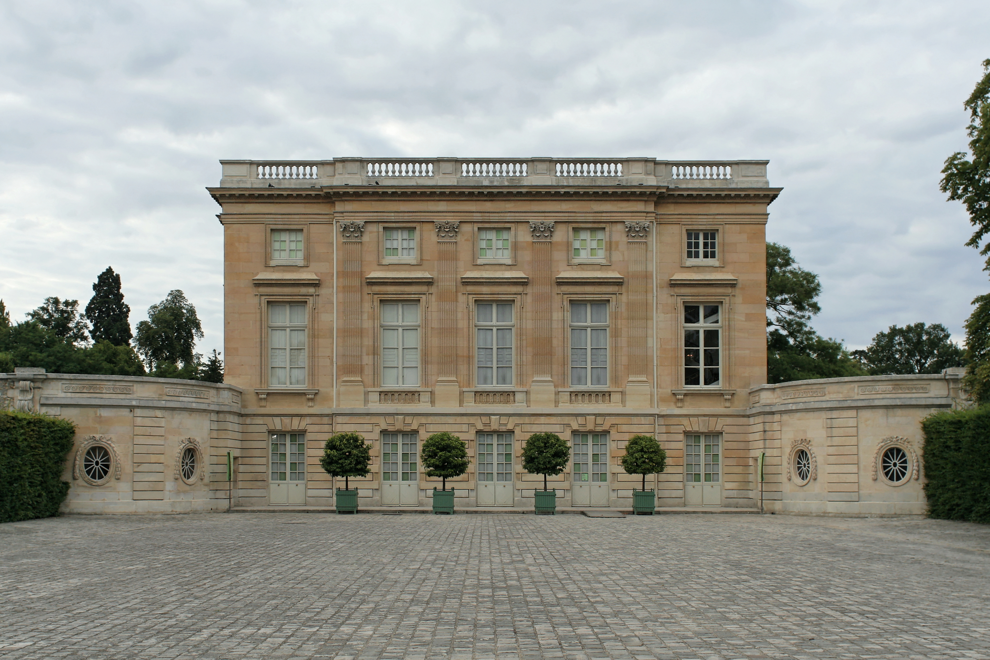 Petit Trianon, façade sud donnant sur la cour d'entrée : un étage de soubassement à bossage, deux étages carrés liés par quatre pilastres corinthiens colossaux sur l'avant-corps central.